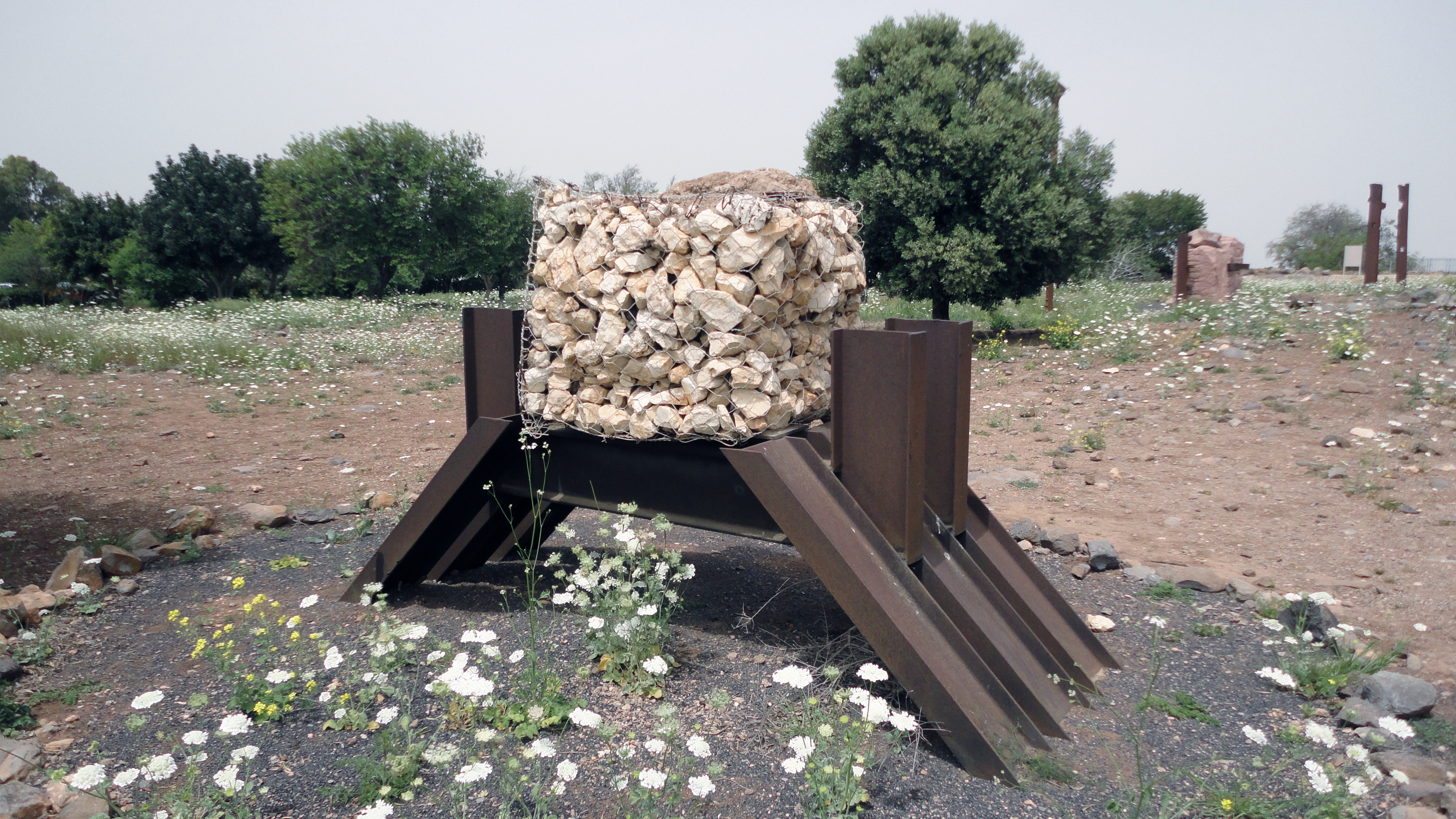 Sculpture